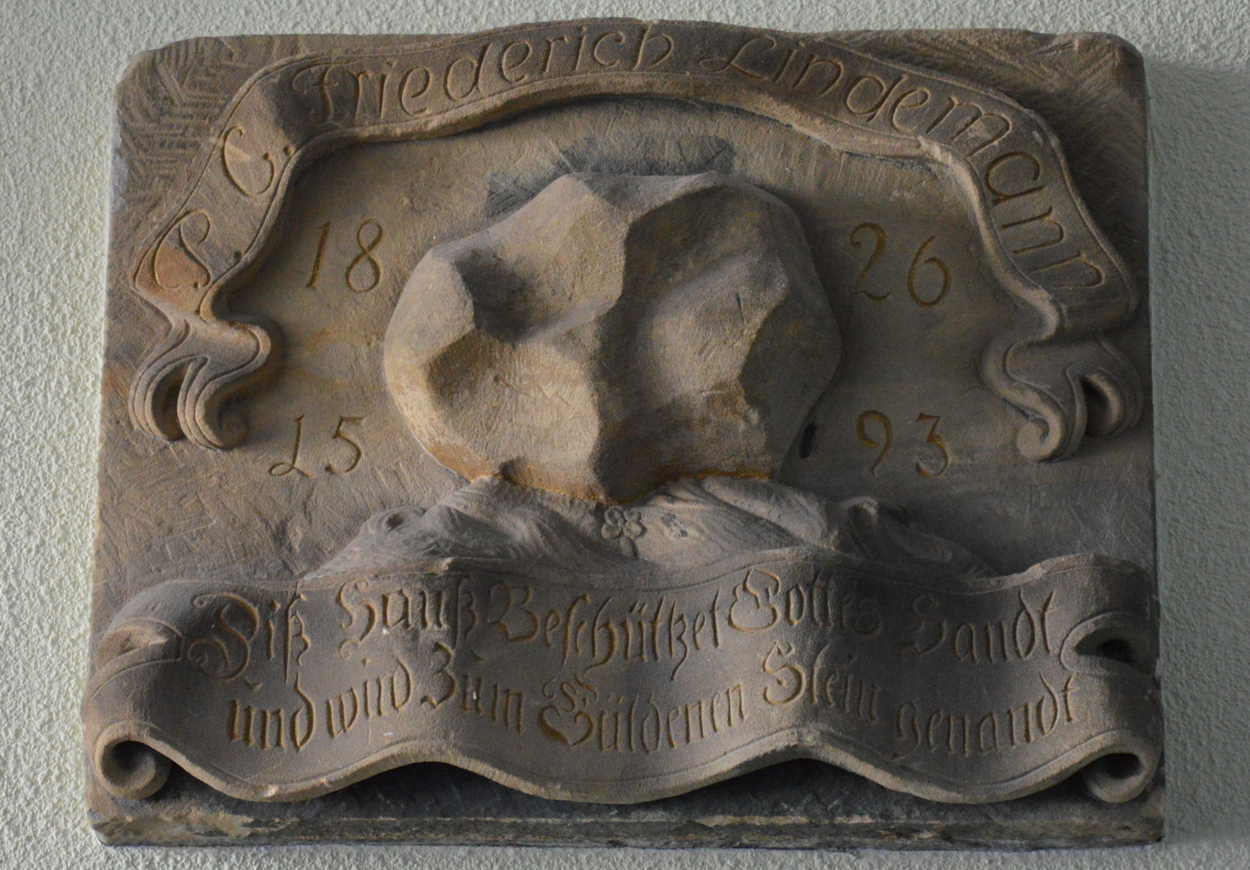 Alter Markt 12, 13 Hauszeichen Magdeburg